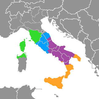 Lingue centromeridionali italiane. Gruppo toscano Gruppo centrale (romanesco ecc.) Gruppo meridionale (napoletano, apulo-barese) Gruppo meridionale estremo (siculo-calabrese e salentino)